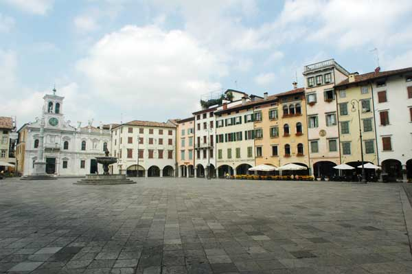 tutti i diritti concessi - Gian77